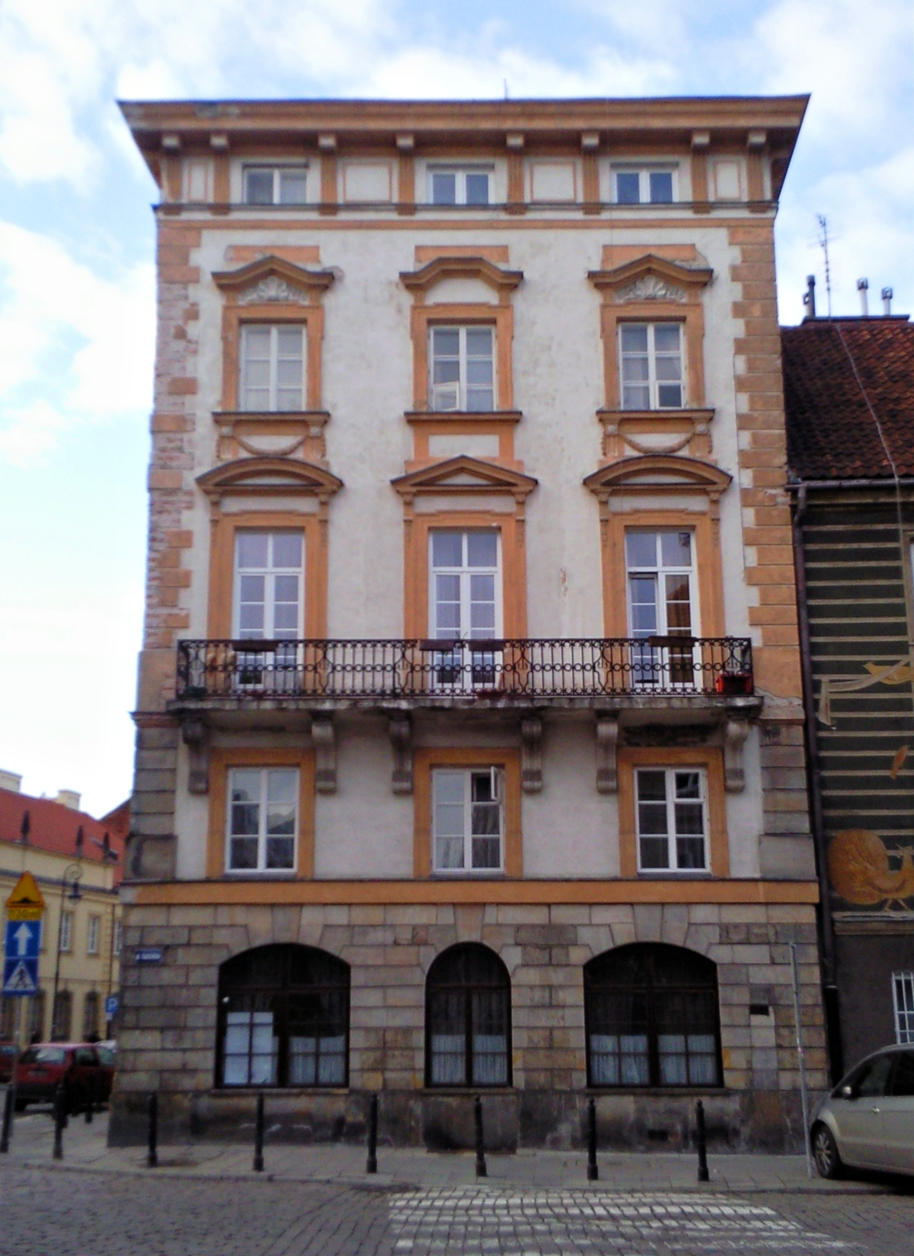 Widok Pałacu Mokronowskich od ul. Kościelnej